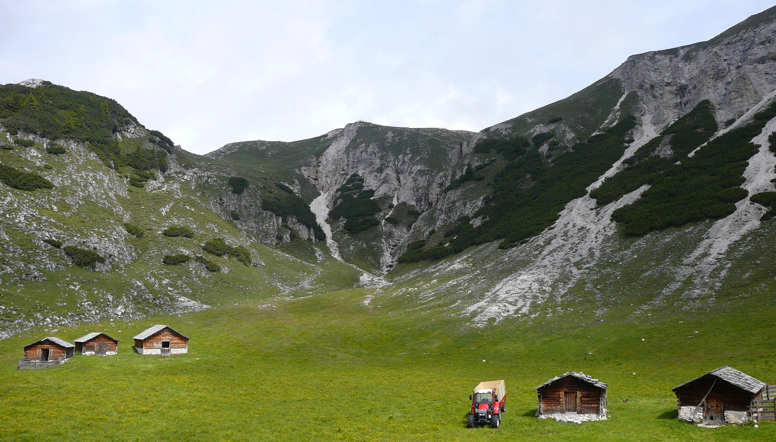 Tre capanne